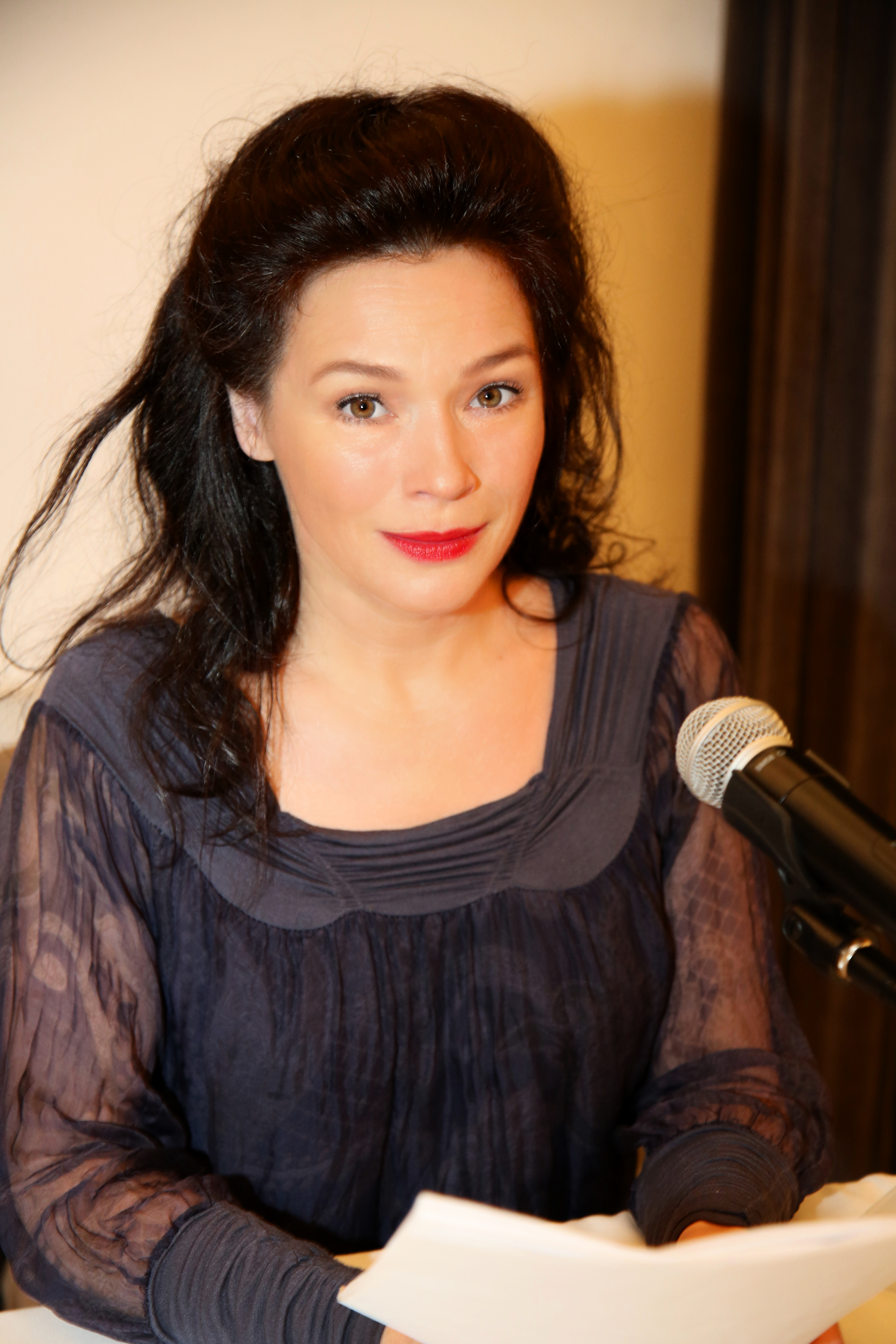 09.06.2015: Julia Stemberger las Egon Erwin Kisch im Literatur-Cafe der Israelitischen Kultusgemeinde Wien